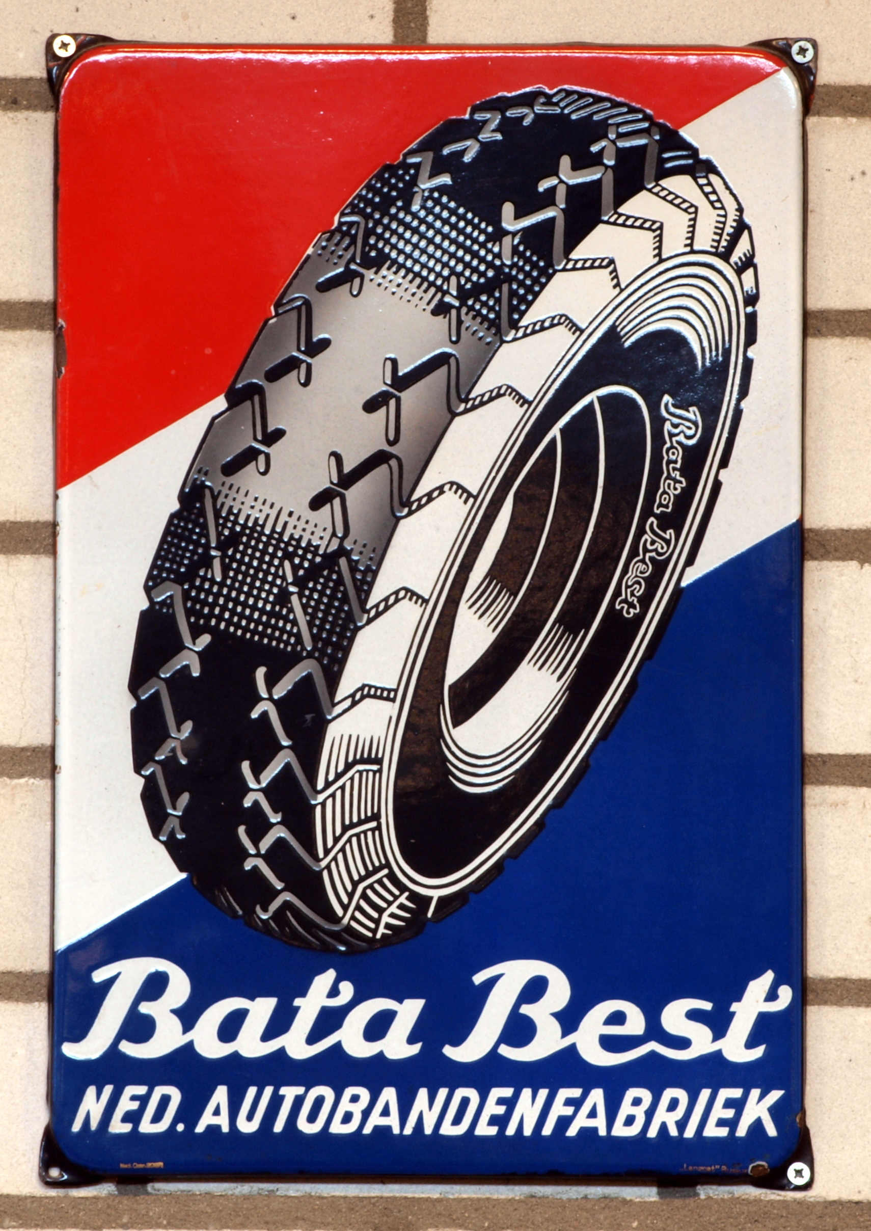 Den Hartogh Ford Museum. Bata Best enamel advert sign